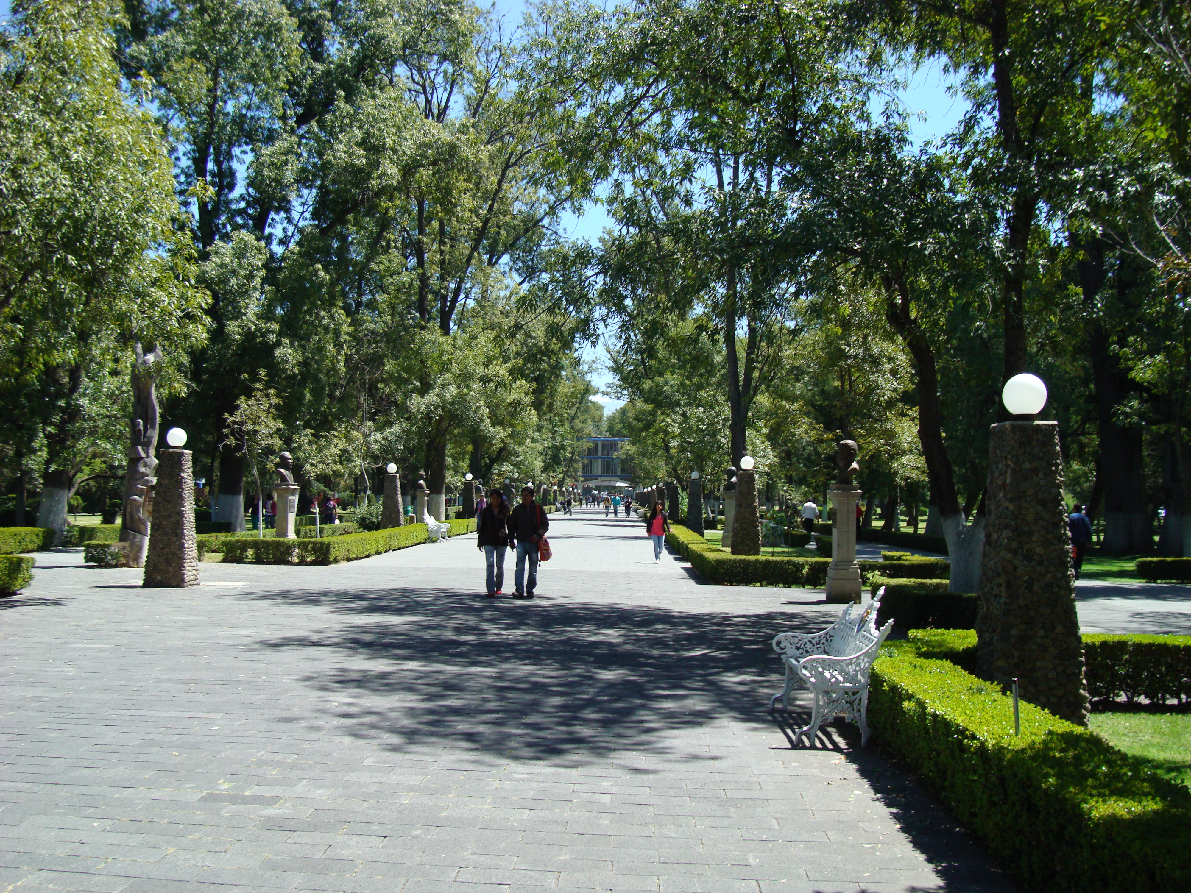 La calzada de los agronomos ilustres en un día cualquiera de la semana.